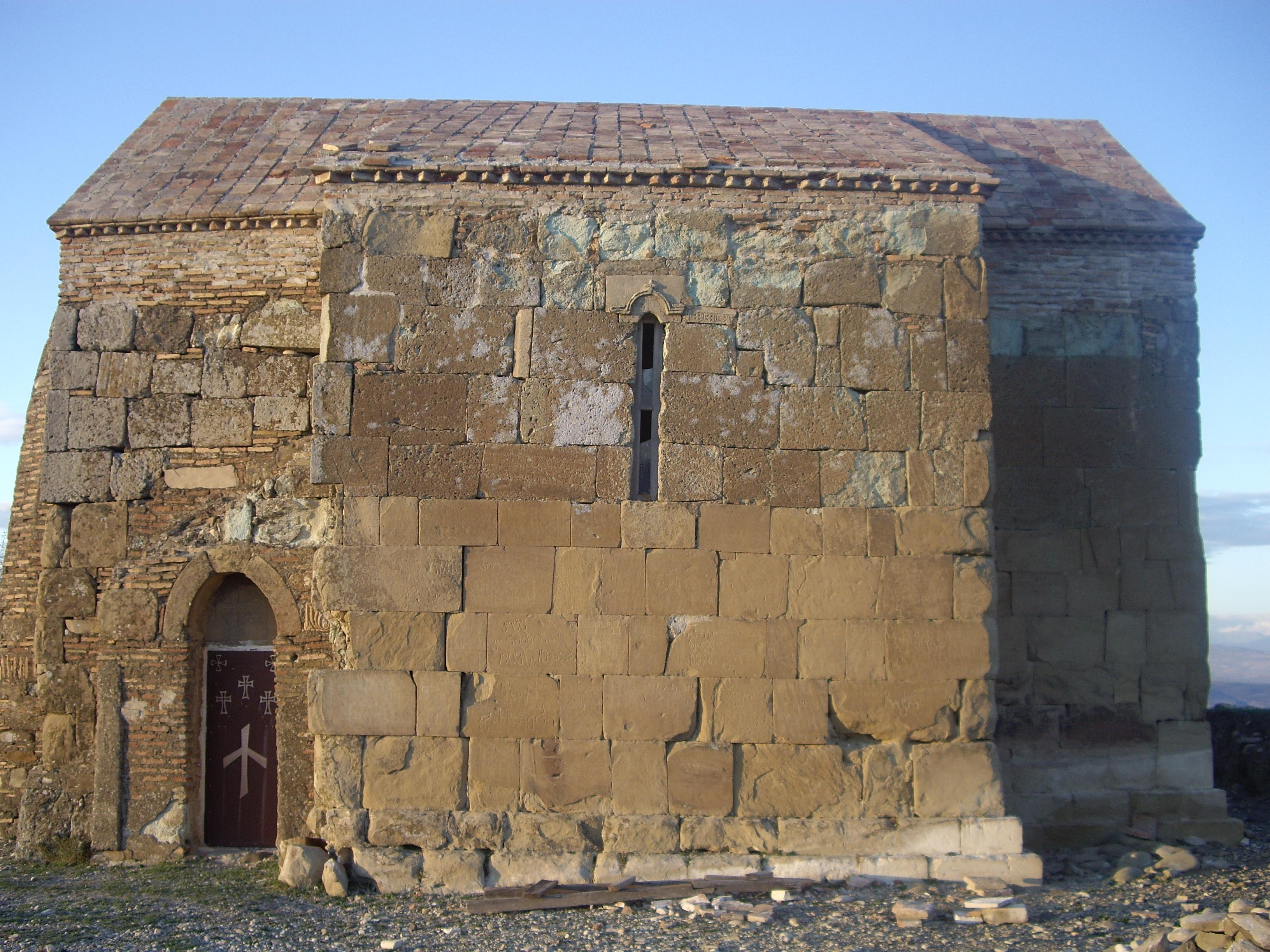 აღაიანის წმ. ნინოს ეკლესია - სამხრეთი ფასადი